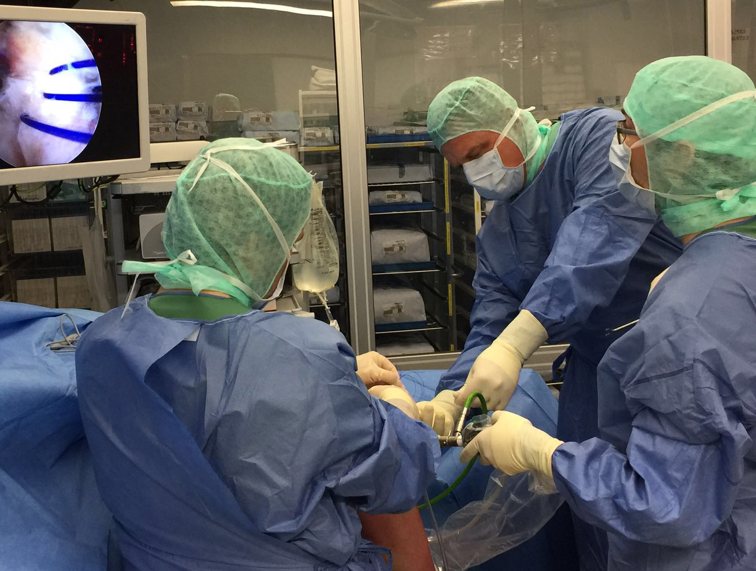 Durchführung einer Arthroskopie am Knie